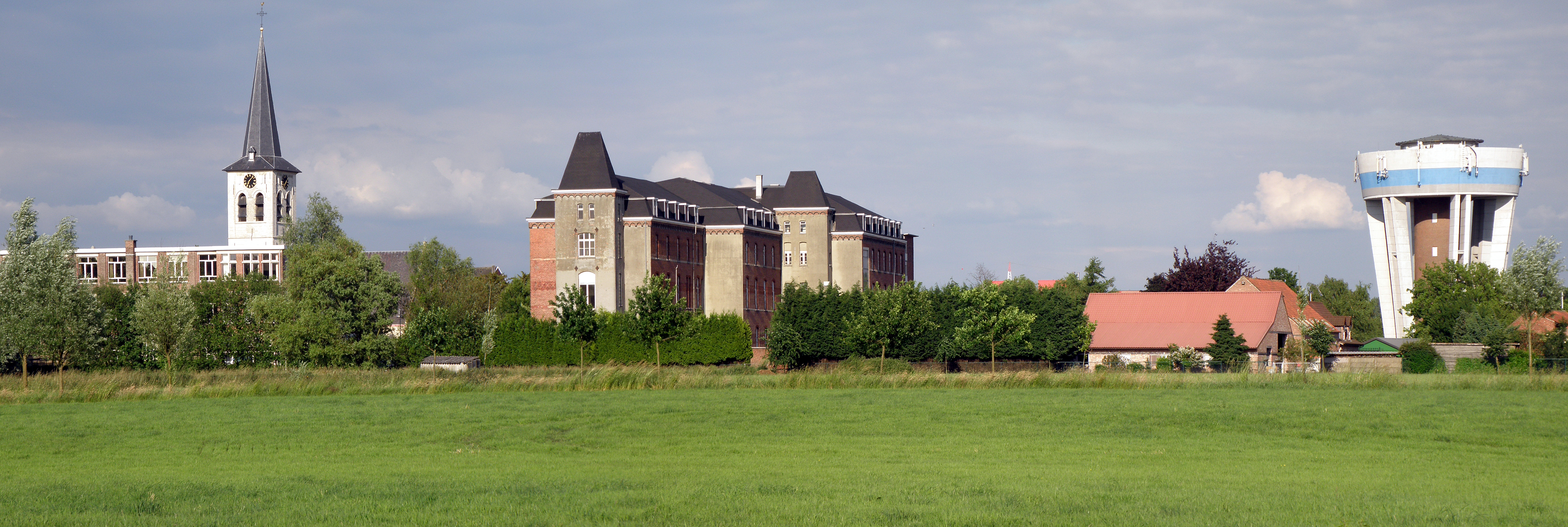 Borsbeek bij Antwerpen. Dorpskern gezien vanuit het zuiden. Van links naar rechts: Sint-Jacobuskerk, Sint-Jozefinstituut, watertoren.